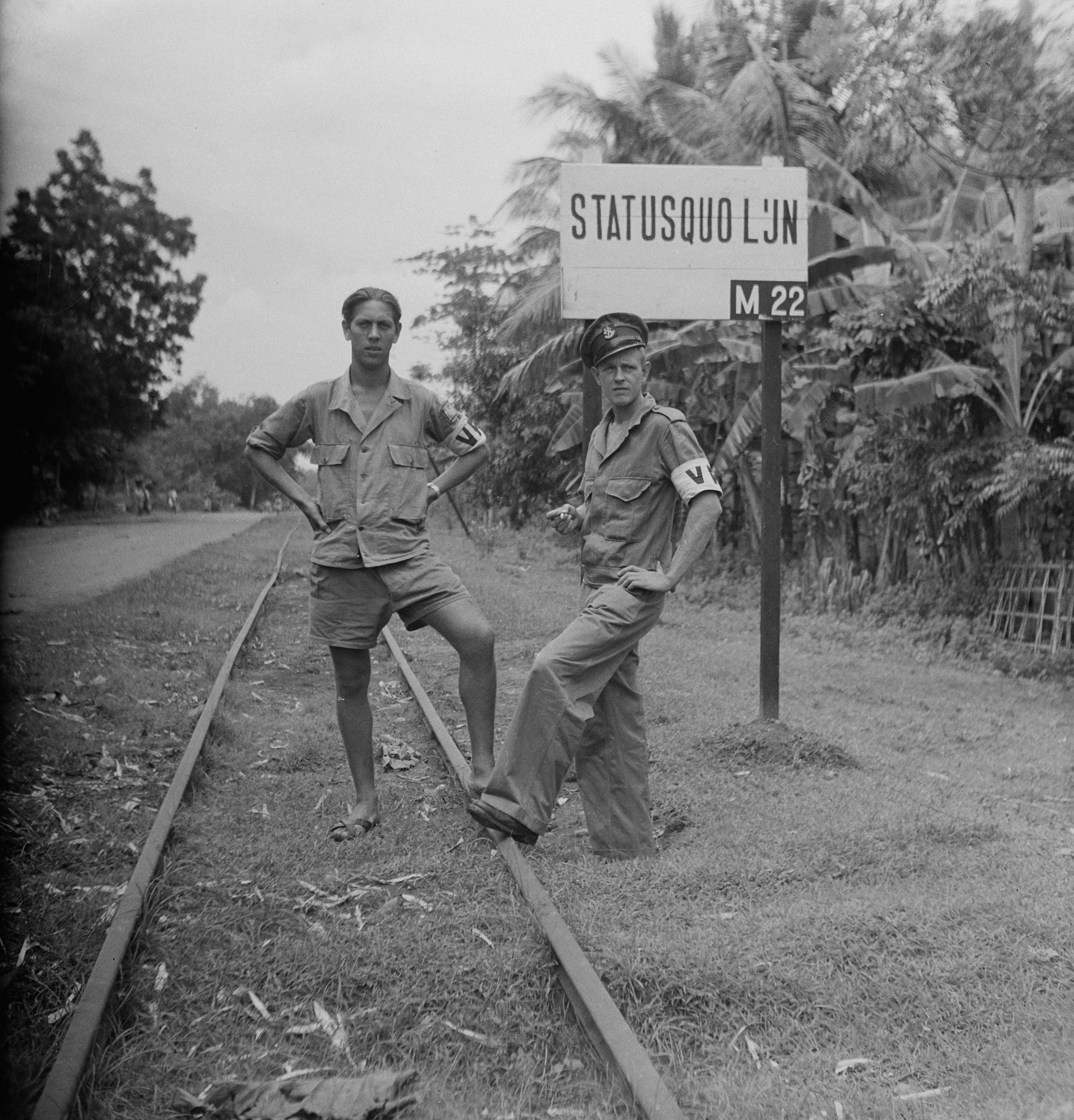 Collectie / Archief : Fotocollectie Dienst voor Legercontacten Indonesië Reportage / Serie : [DLC] Prowoelan nabij Modjokerto status-quo lijn Beschrijving : [twee Nederlandse militairen met armbanden waarop 'VP' (Veldpolitie) staan bij een bord dat de status-quo lijn markeert] Datum : 12 februari 1948 Locatie : Indonesië, Nederlands-Indië Fotograaf : Scheidema, [...] / DLC Auteursrechthebbende : Nationaal Archief Materiaalsoort : Negatief (zwart/wit) Nummer archiefinventaris : bekijk toegang 2.24.04.03 Bestanddeelnummer : 12942